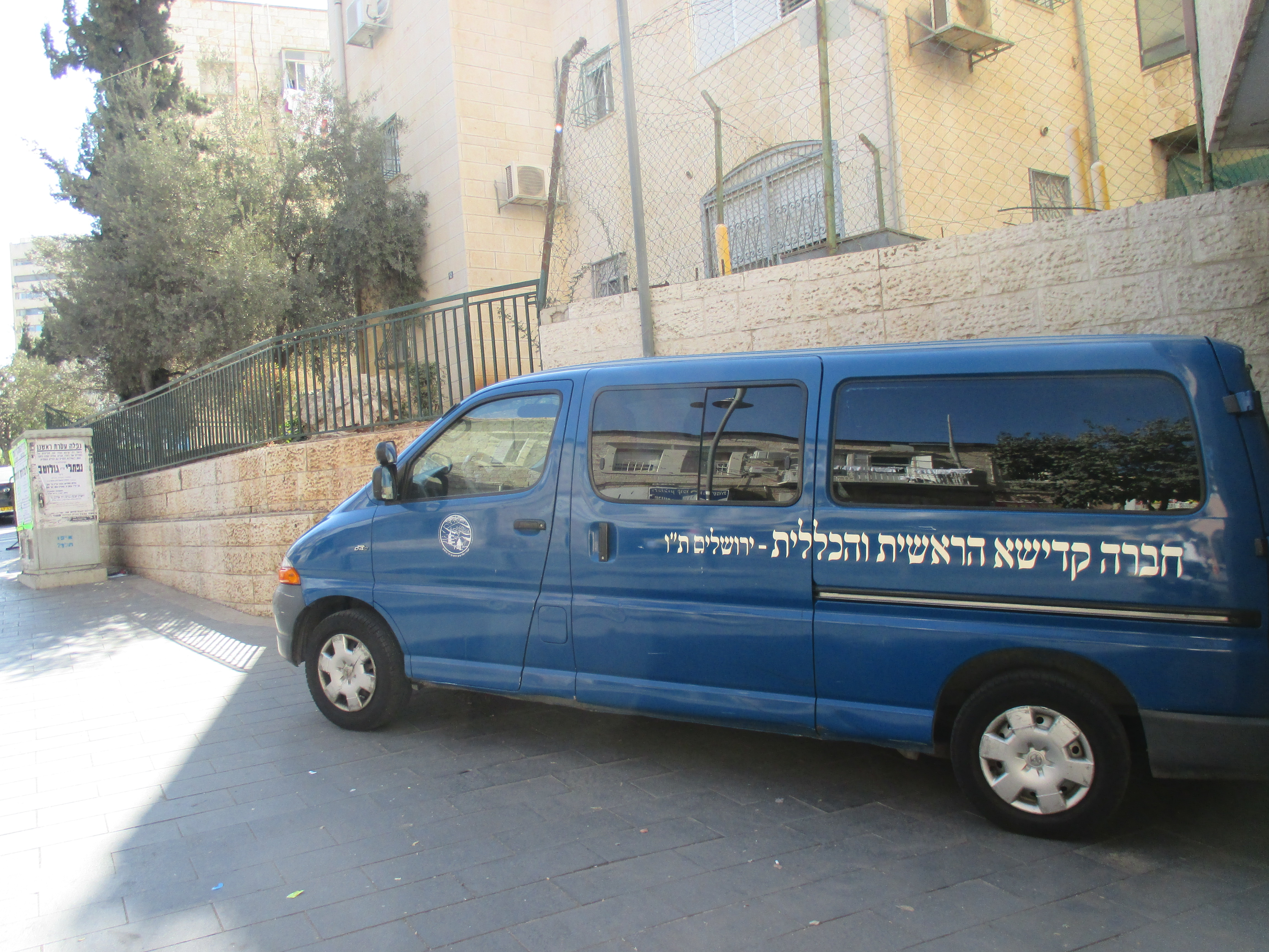 רכבי החברה קדישא צבועים בדרך כלל כחול